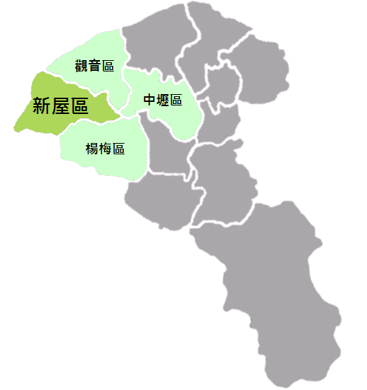 新屋區位置圖